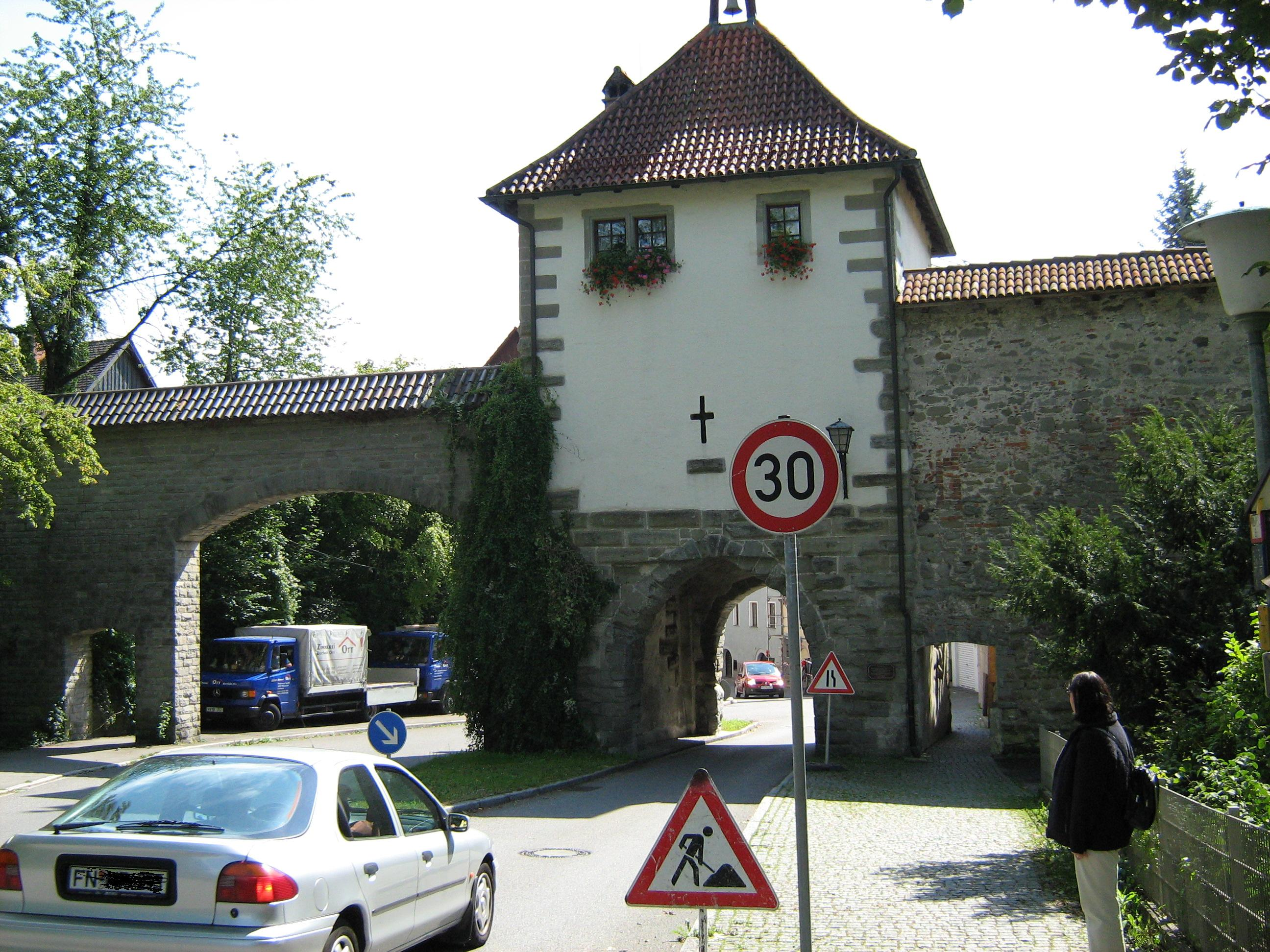 Aufkircher Tor von 1452 in Überlingen am Bodensee